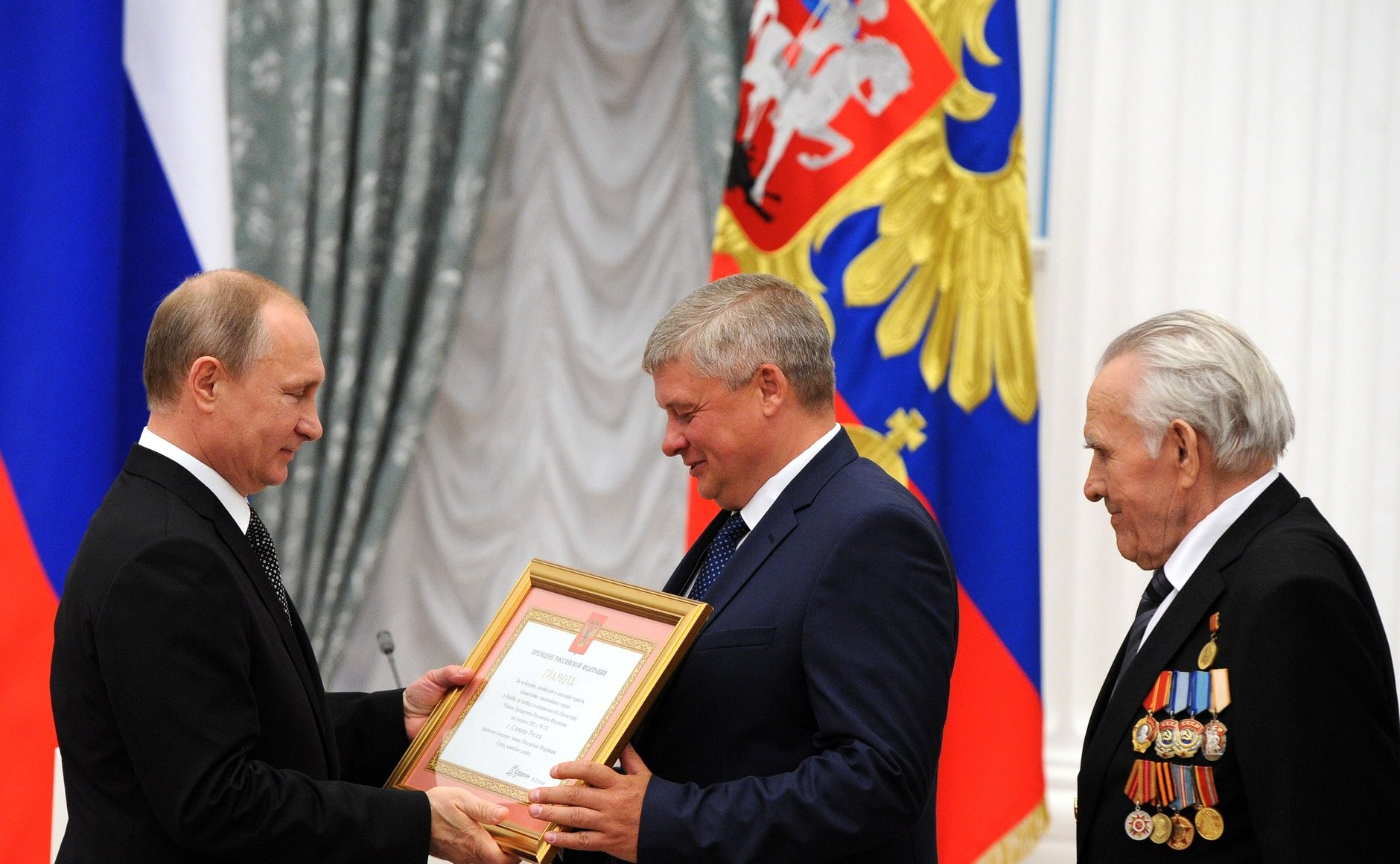 Вручение грамот о присвоении звания «Город воинской славы». Грамота о присвоении почётного звания «Город воинской славы» вручена представителям Старой Руссы.